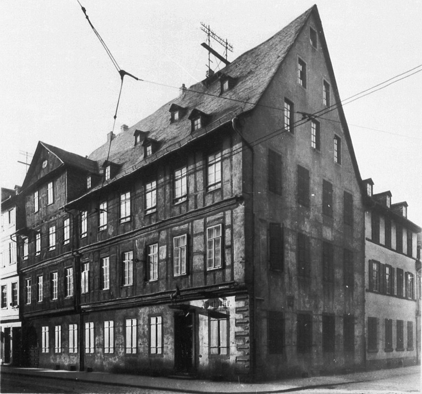 Haus Einhornapotheke, Nürnbergerstraße 41/Ecke Kölnische Straße. Fahrleitung der Hanauer Straßenbahn im Bild.